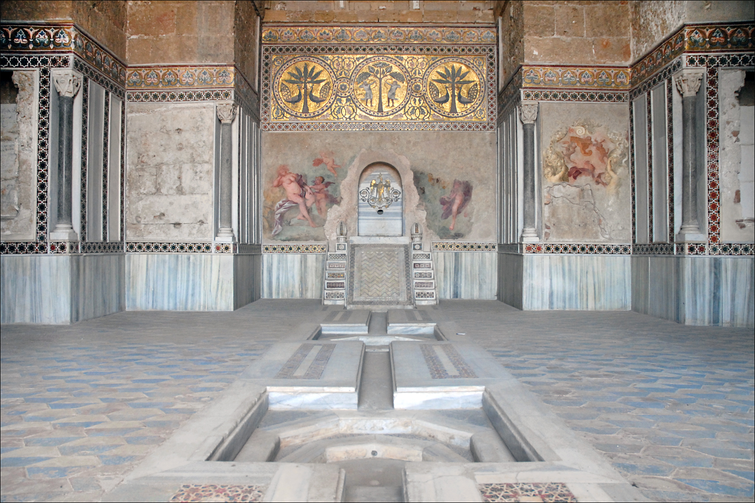 La Zisa (aziz en arabe signifie "la splendide") était une des résidences, situées en dehors de la Palerme médiévale, dans le parc royal appelé Génoarde, construites par les souverains normands de Sicile et destinées à leurs loisirs. La construction du palais a commencé en 1164 sous le règne de Guillaume de Hauteville, dans le style arabe, elle a été achevée sous celui de son fils vers 1175. Remaniée de nombreuses fois depuis sa construction, des travaux de restauration lui ont rendu un aspect voisin de l'origine. Elle est dotée d'un système de refroidissement de l'air grâce à des ouvertures judicieusement placées dans les différentes pièces du bâtiment. Les parties basses comprenaient des pièces destinées aux réceptions, les parties hautes étaient privées. Située au rez-de-chaussée, la salle de la fontaine était la principale salle de réception du palais, elle était ouverte sur les jardins, sa fontaine déversait l'eau dans le grand bassin extérieur à travers les vasques visibles sur la photo. La salle occupe un espace de deux étages, elle est conçue comme un îwân orné de niches, aménagées dans l’épaisseur des murs et décorées de muqarnas. Une frise en mosaïque représentant des chasseurs et des paons court le long des murs. Les photographies sont interdites dans les autres espaces de l'édifice, les étages supérieurs comprennent un petit musée d'art islamique sans grand intérêt. La notice de la Zisa sur la base Qantara Article de Wikipedia sur la Zisa